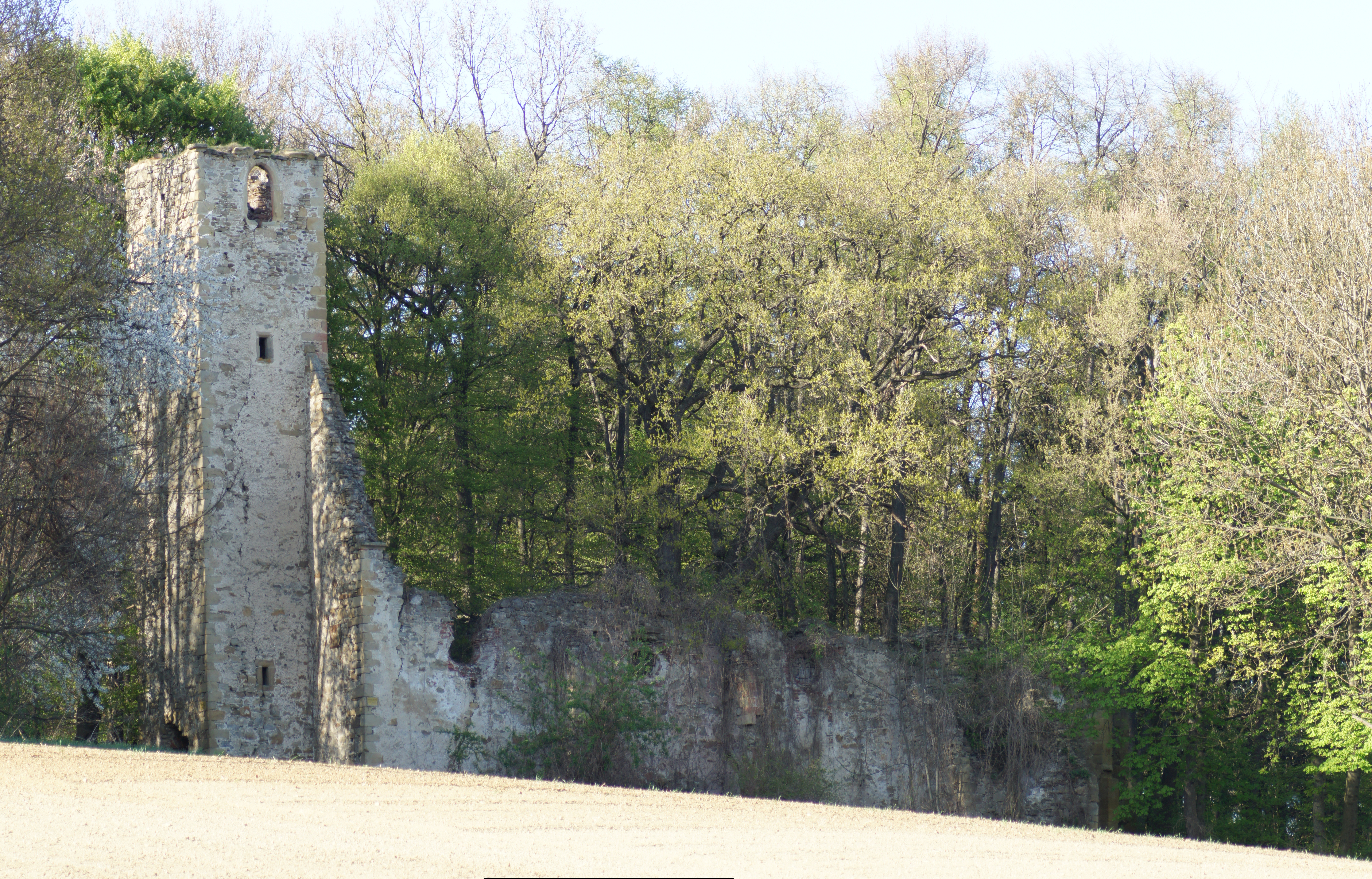 Die Kirchenruine St. Cäcilia in Pyhra, Bezirk Sankt Pölten-Land